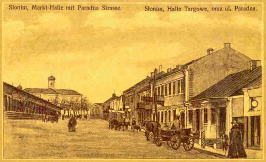 Paradna Street in Sonim